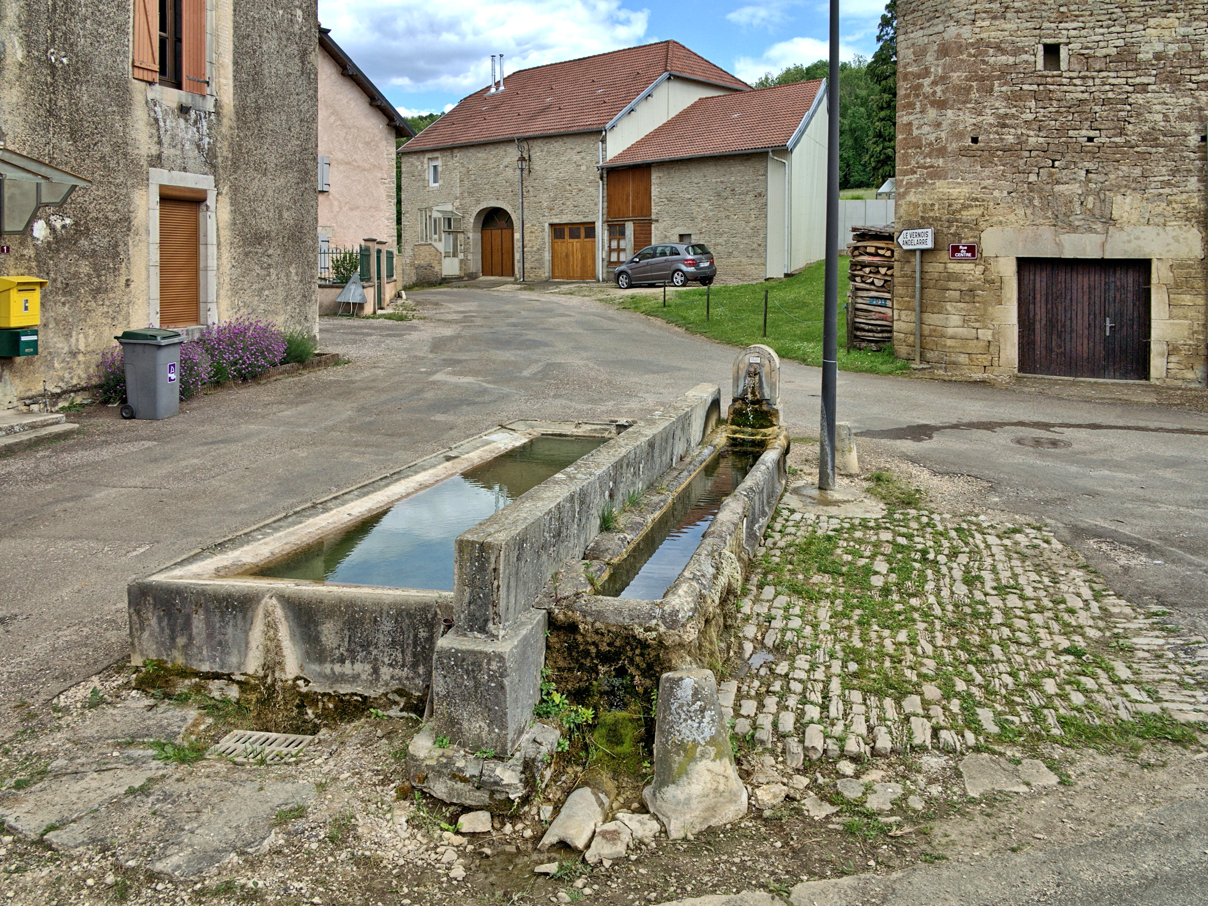 La fontaine-lavoir-abreuvoir